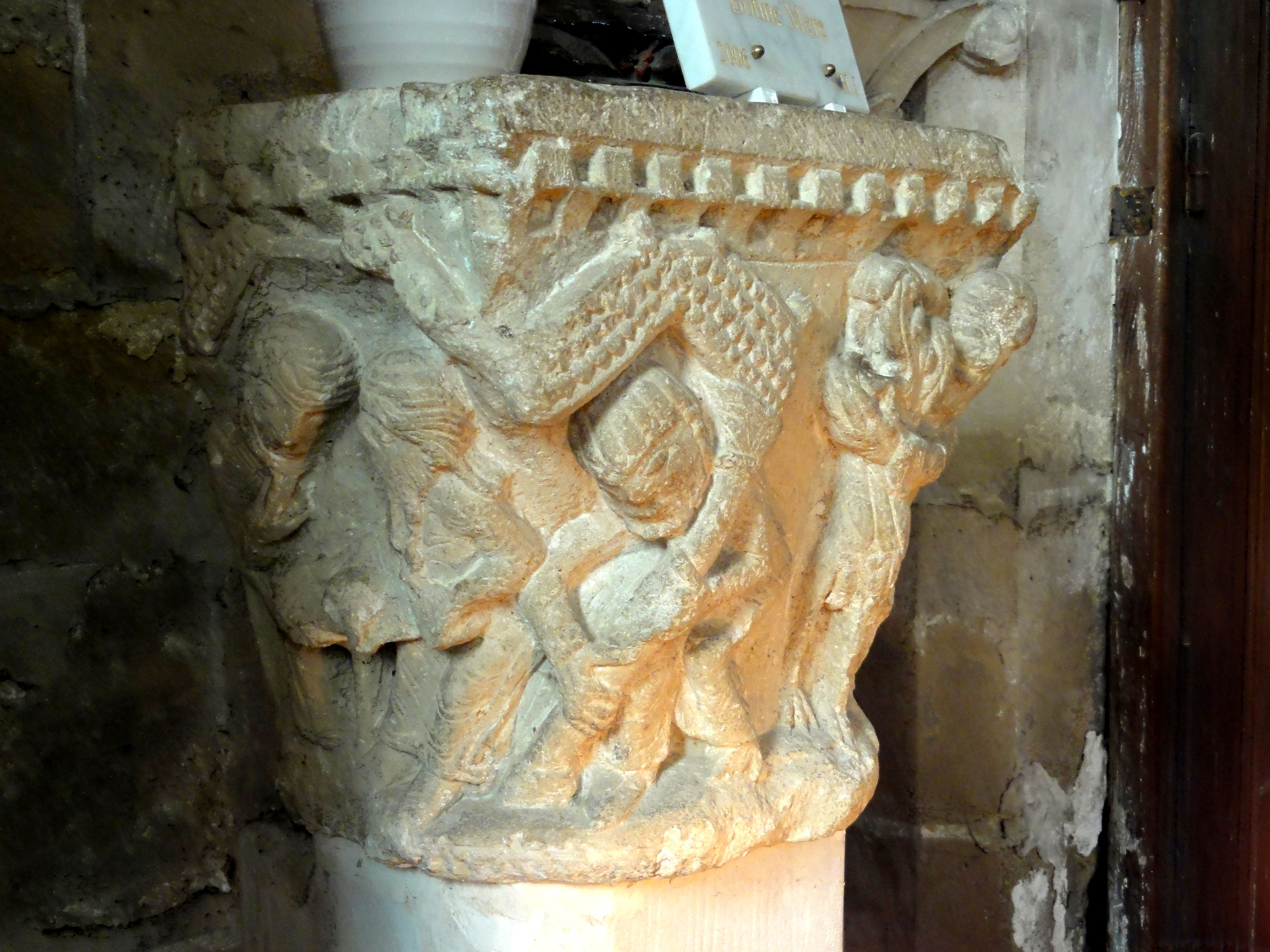 Chapiteau roman déposé, retrouvé en 1960.